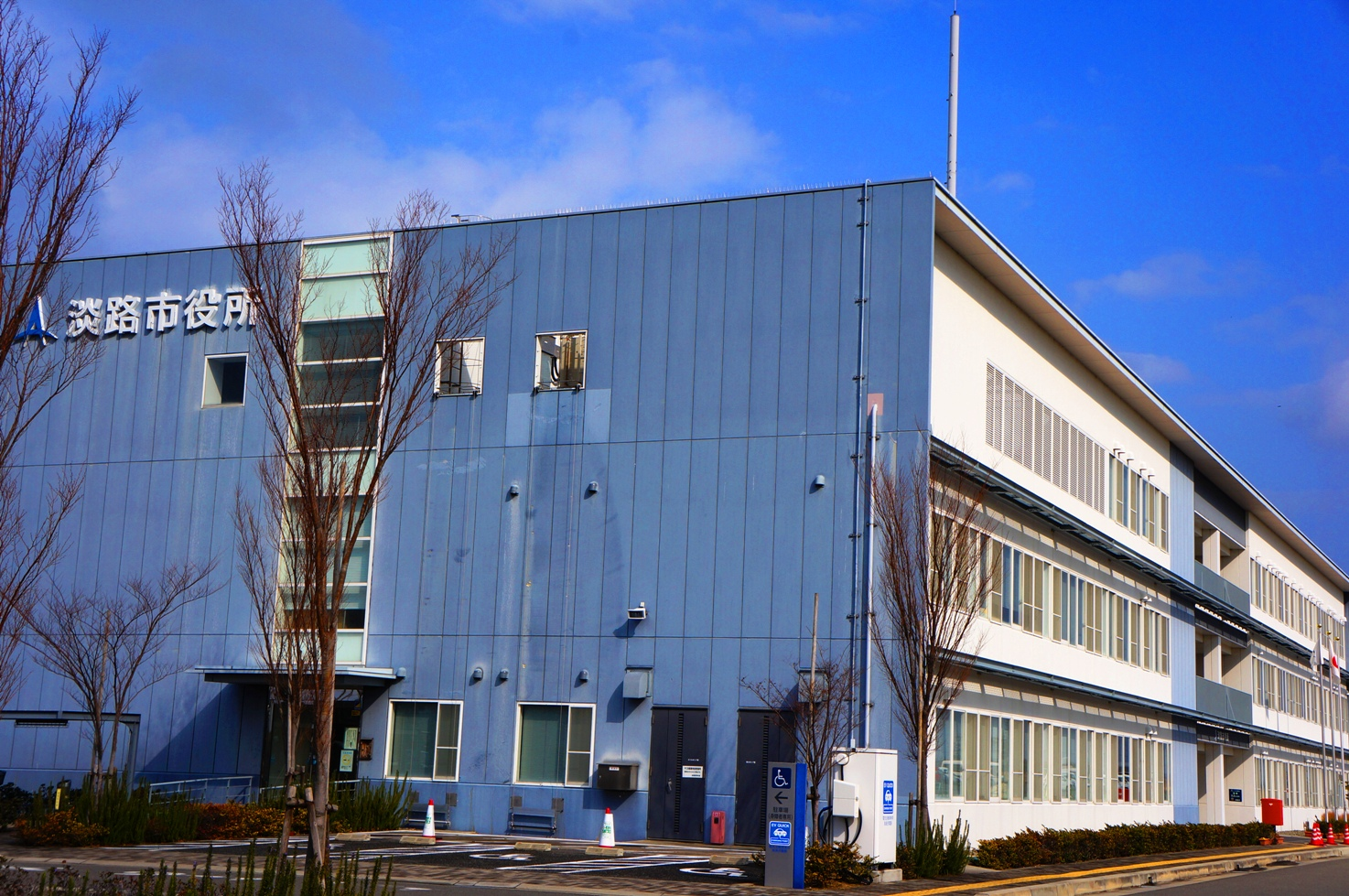 兵庫県淡路市役所本庁舎